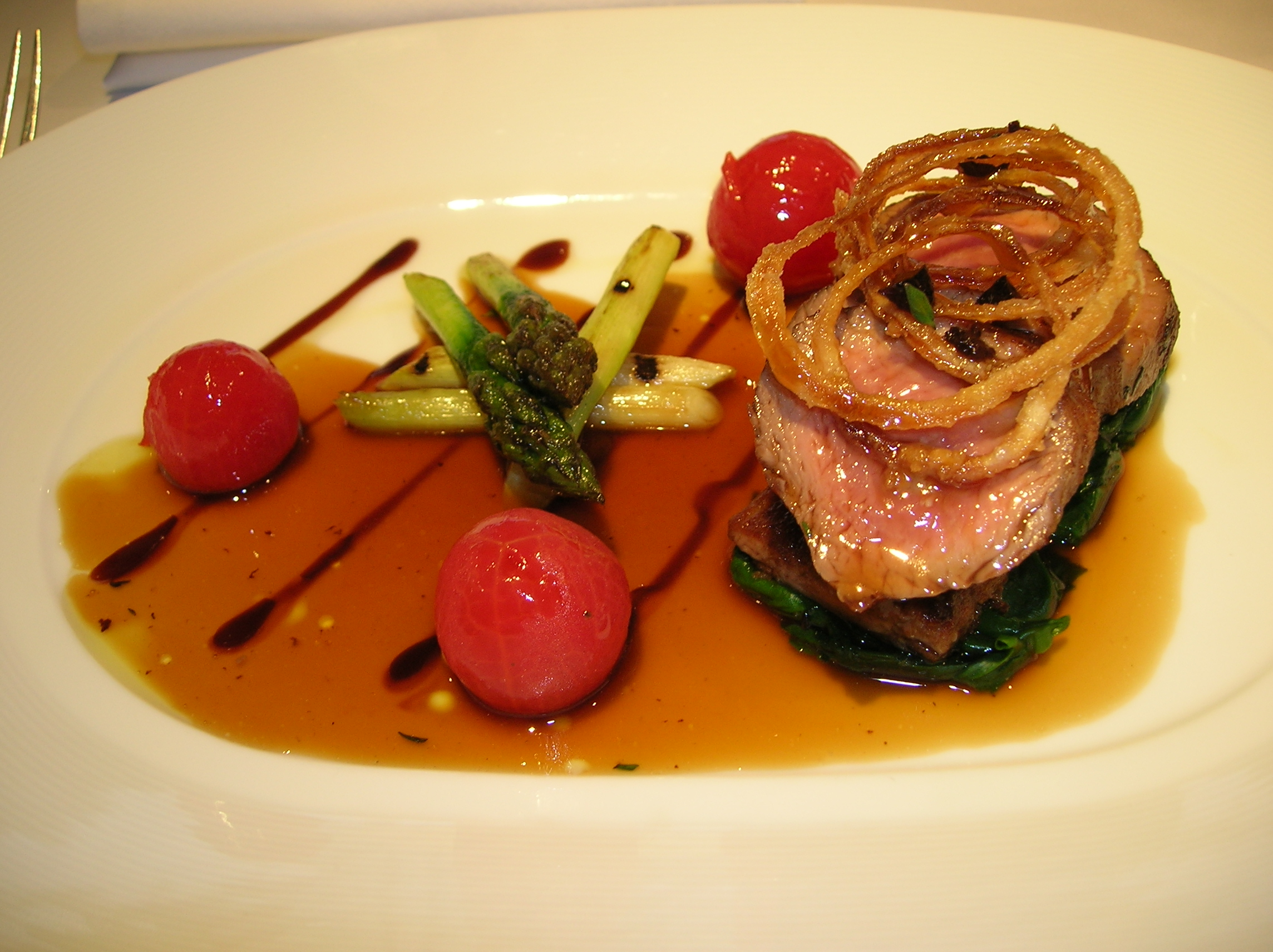 קנון של טלה מקורנוול במסעדת גורדון רמזי